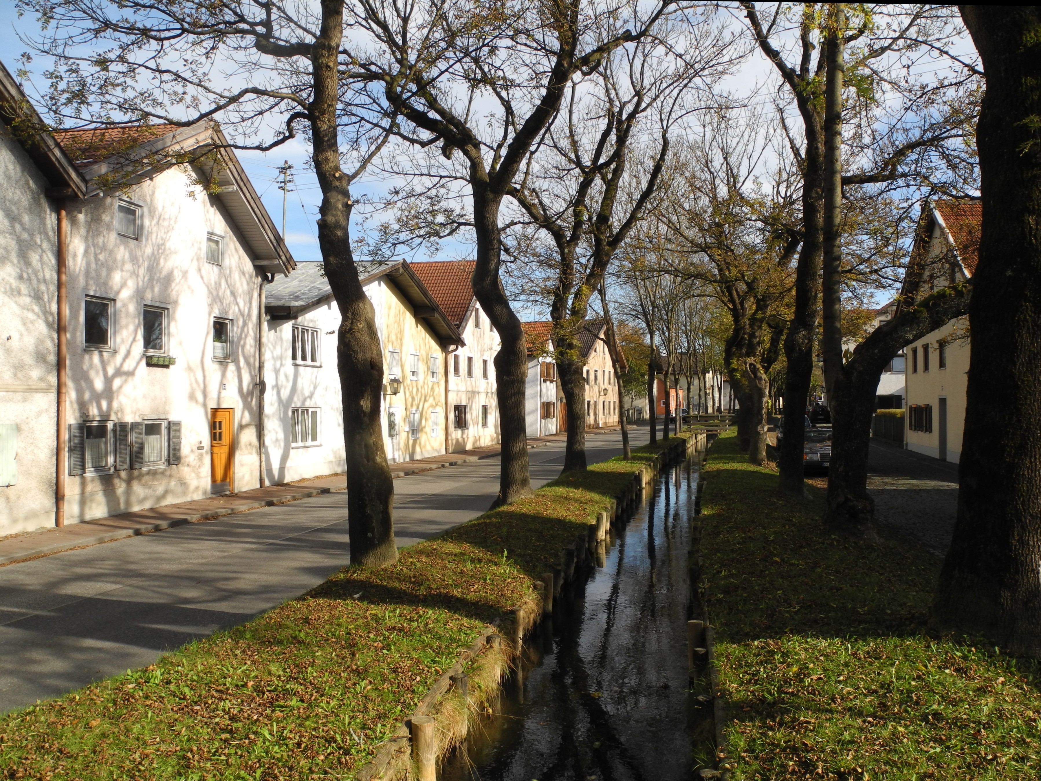 Weilheim - Häuser am Angerbach